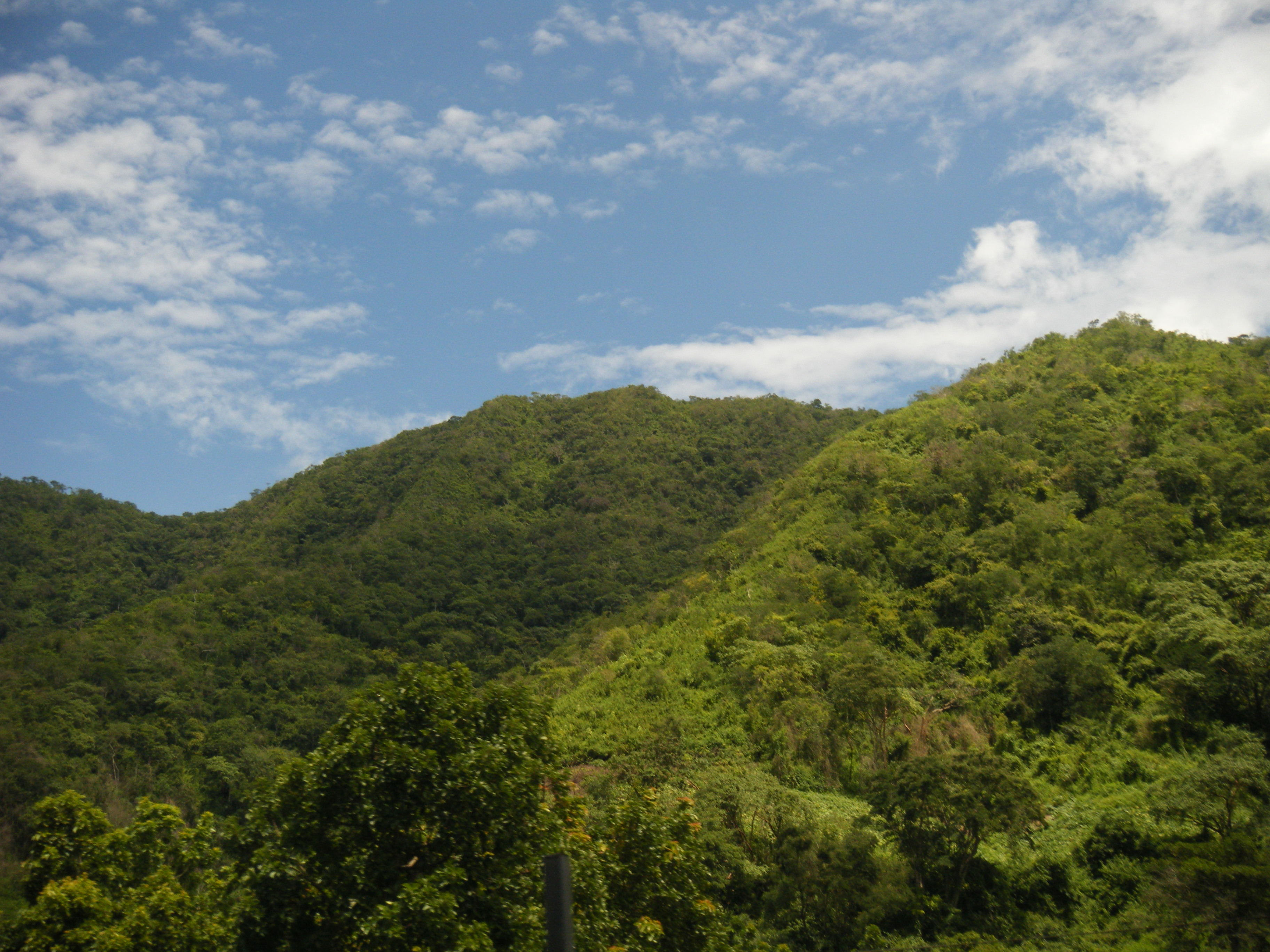 Montañas del Municipio Acosta, Estado Monagas, Venezuela.